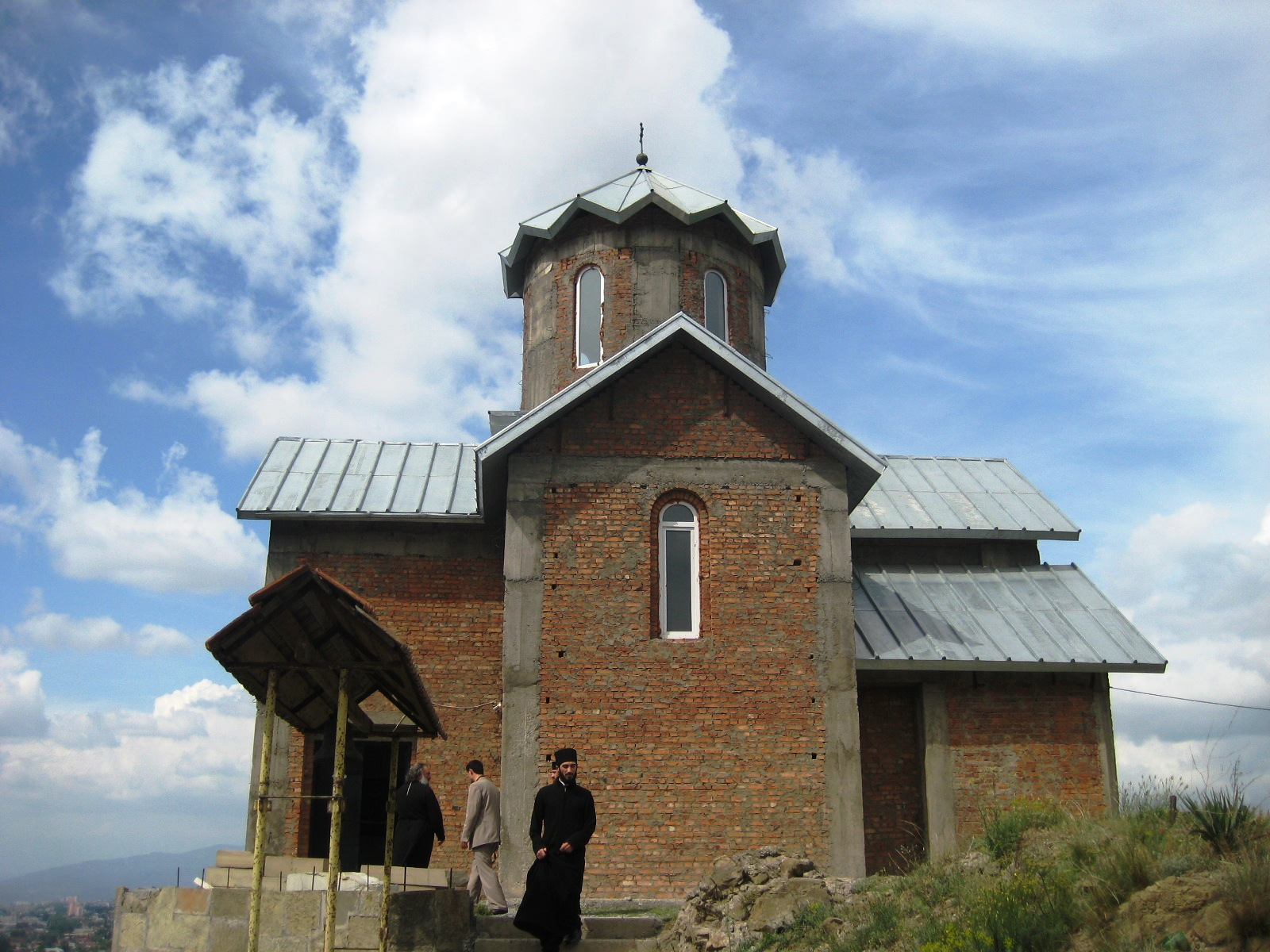 თაბორის მონასტერი